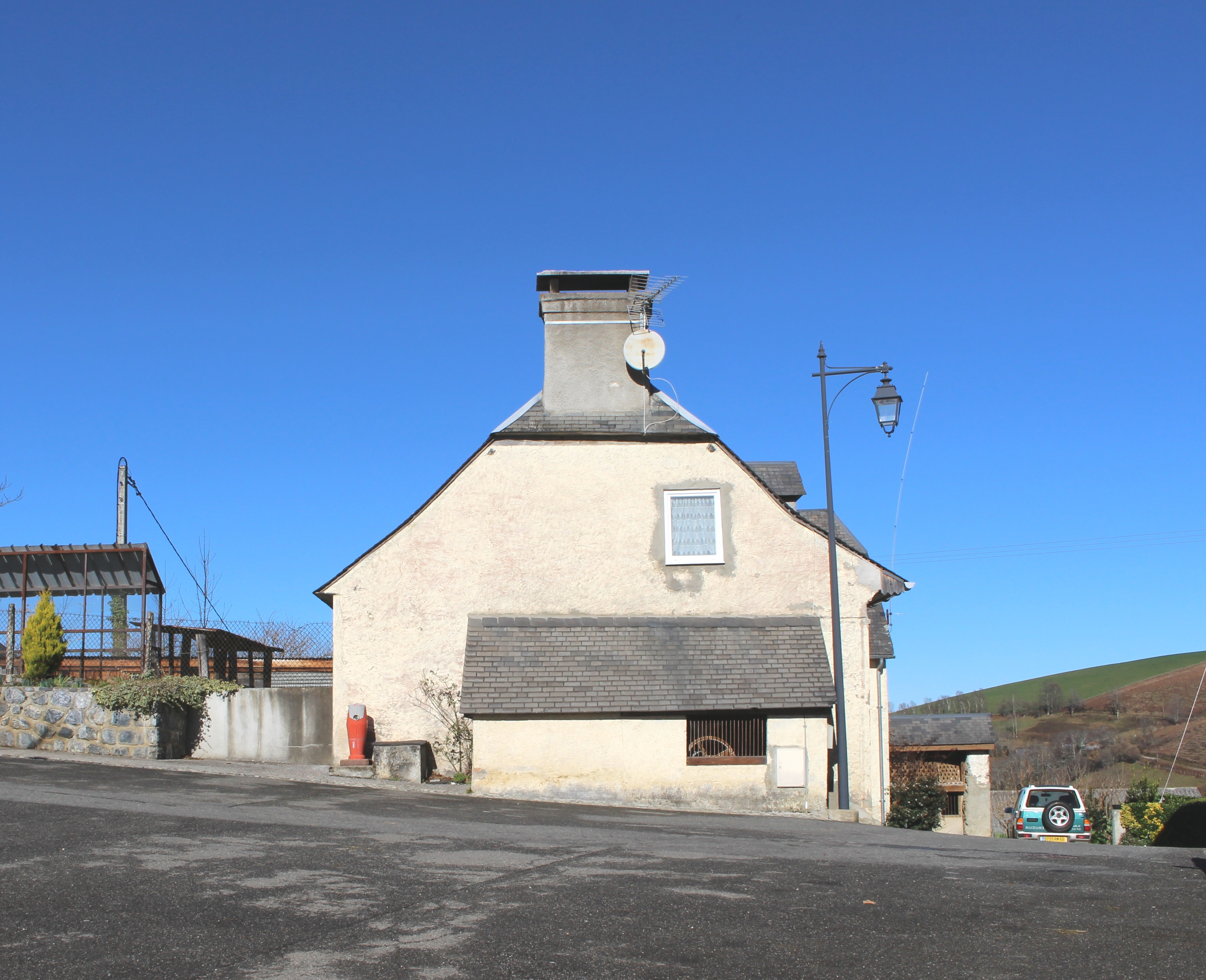 Lavoir de Germs-sur-l'Oussouet (Hautes-Pyrénées)